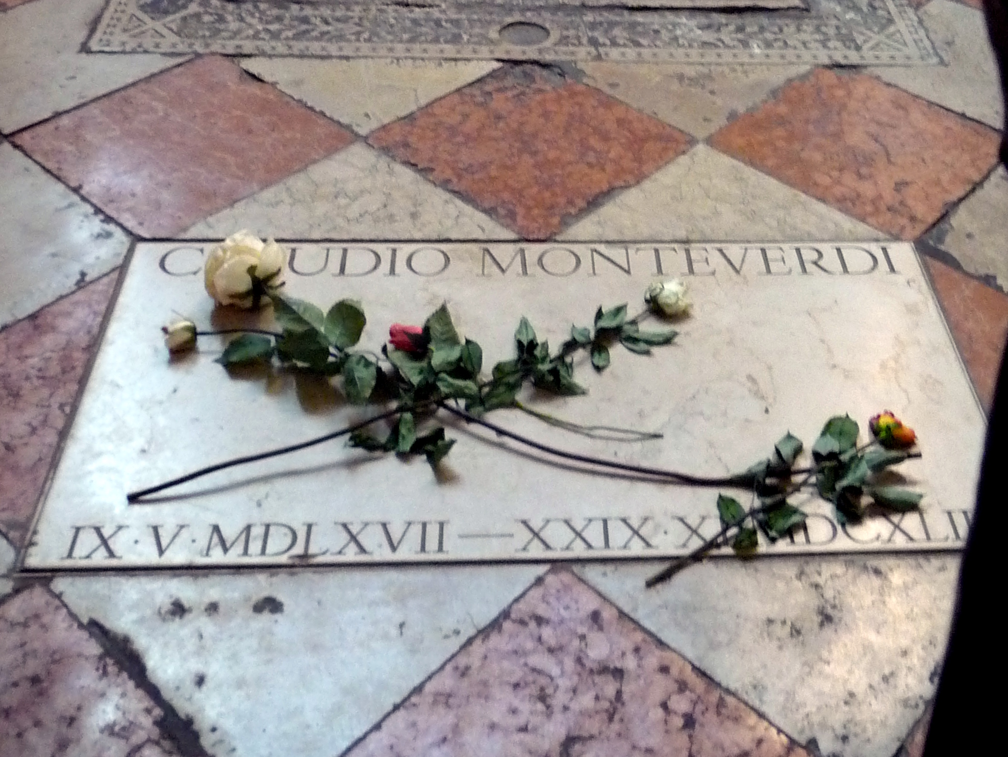 Tomba di Claudio Monteverdi a Venezia nella "Basilica di Santa Maria Gloriosa dei Frari"